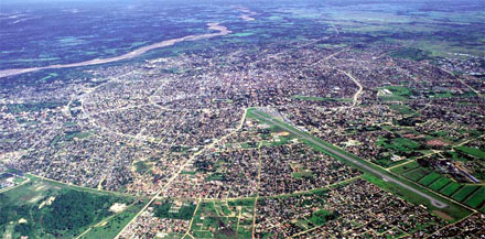 Foto aérea de Santa Cruz tomada desde una avioneta.